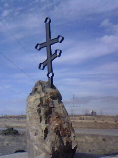 В нескольких метрах от места расстрела на постаменте установлен скальный монолит. На табличке, прикрепленной к нему, перечислены имена двадцати погибших и надпись на могиле: «Упокой, Господи, души убиенных рабов Твоих".